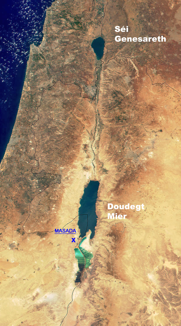 Masada op der Kaart. No enger NASA Foto.